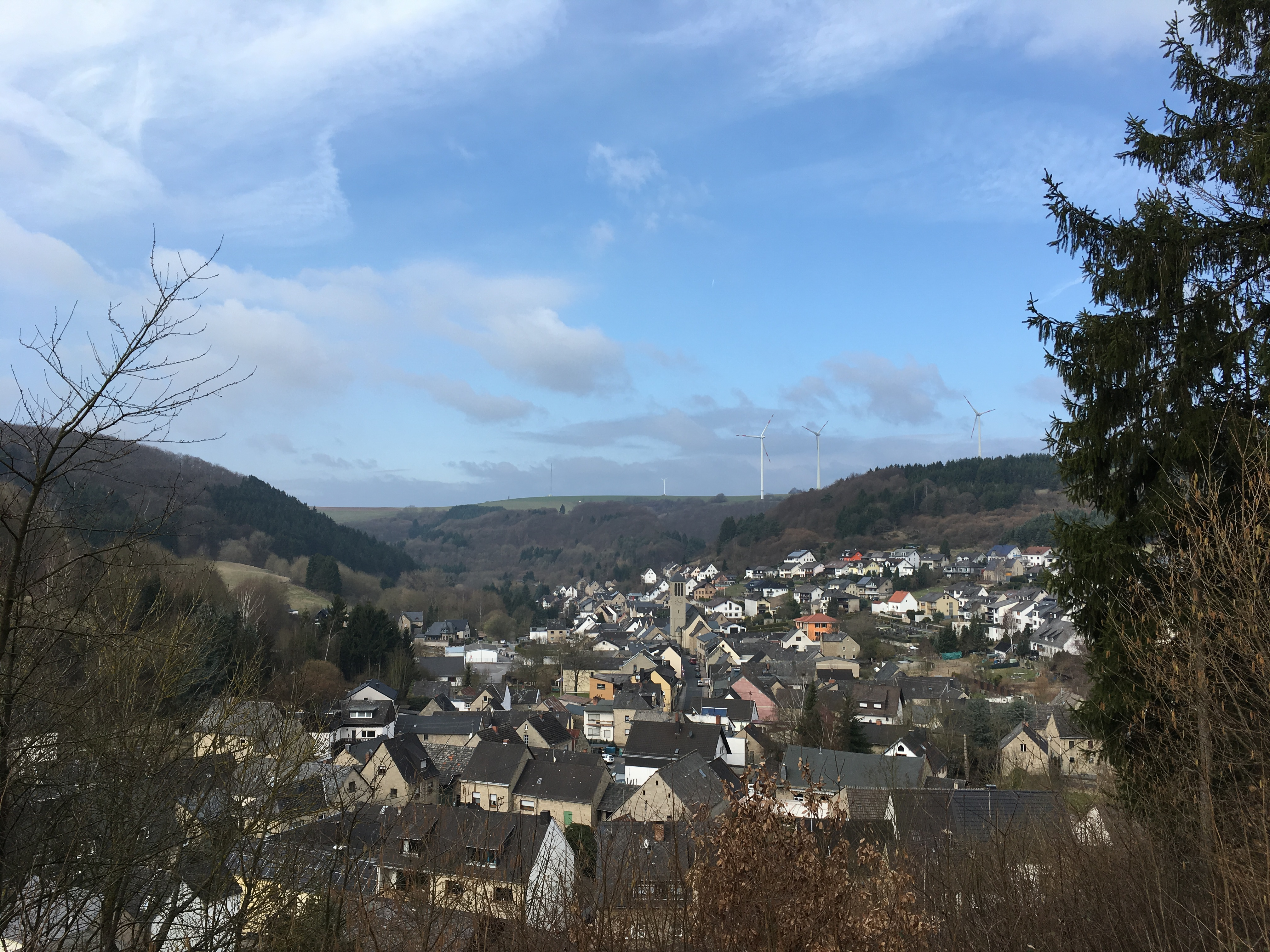 Blick von der Straße Geisenberg nach Rieden, Rheinland-Pfalz